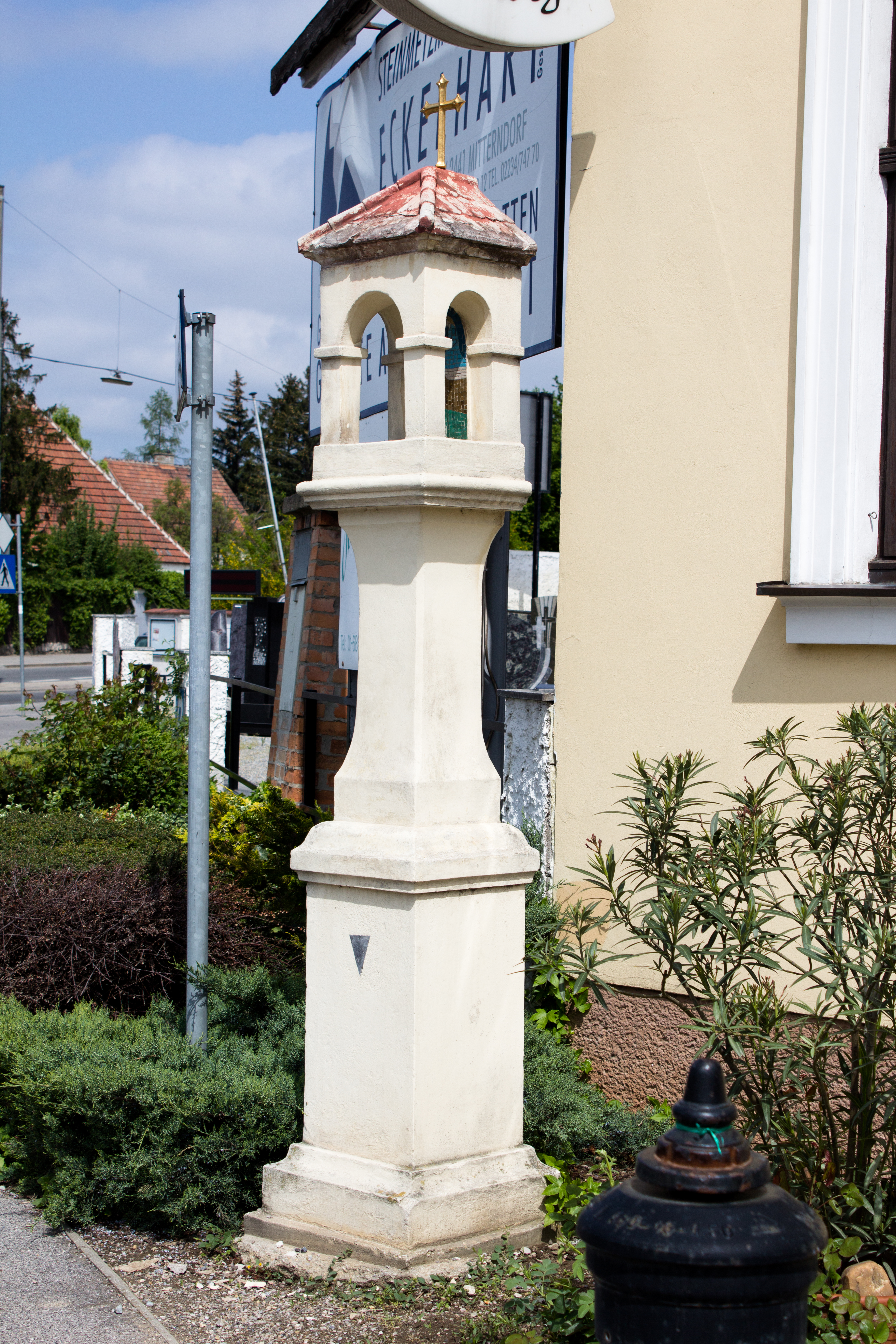 Bildstock